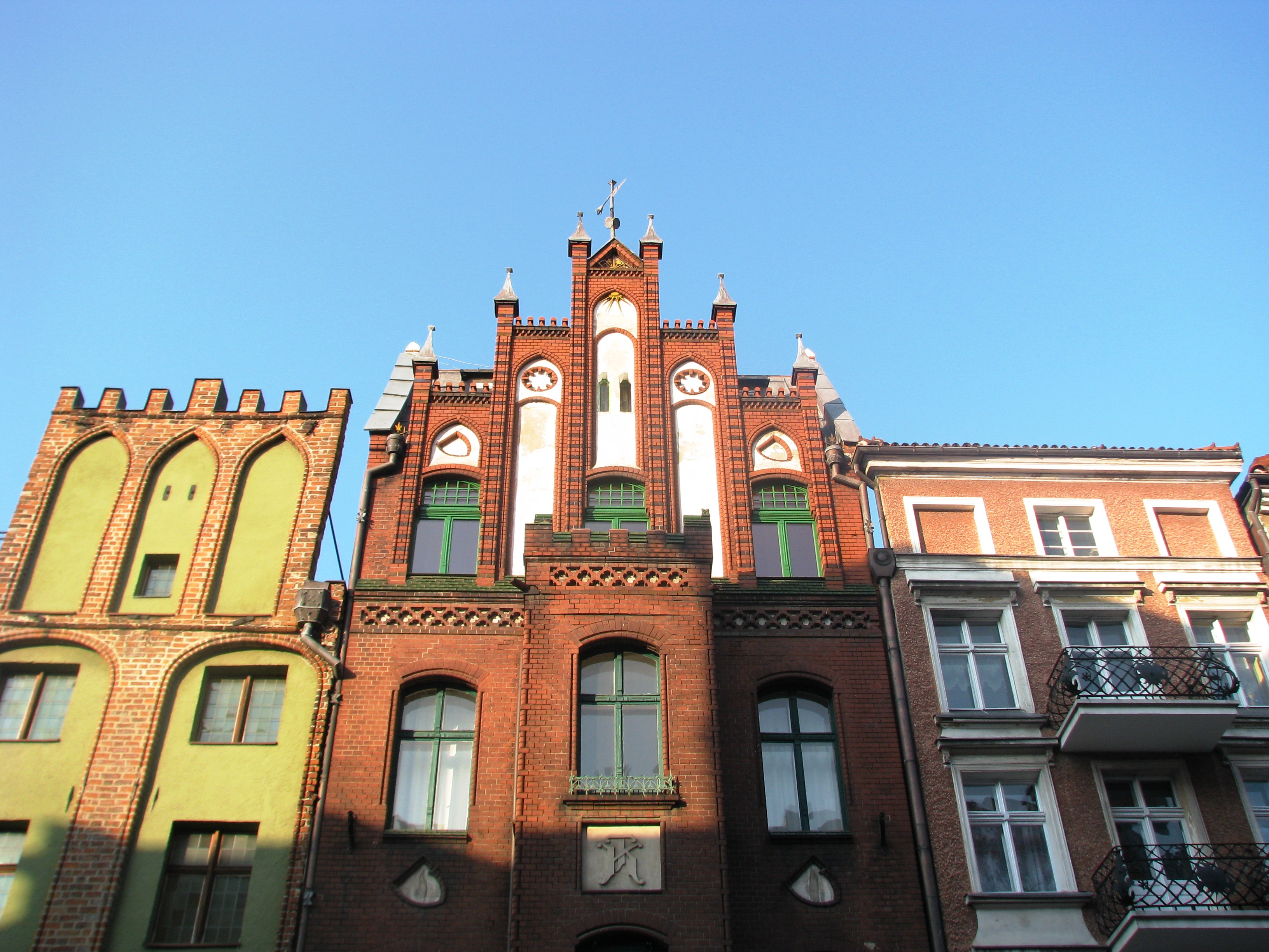 Toruń, ul. Szeroka - partie szczytowe: - ul. Szeroka 38 - kamienica, XIV/XV, XVI/XVII, XVIII, XX - ul. Szeroka 36 - kamienica - ul. Szeroka 34 - kamienica, XV-XIX